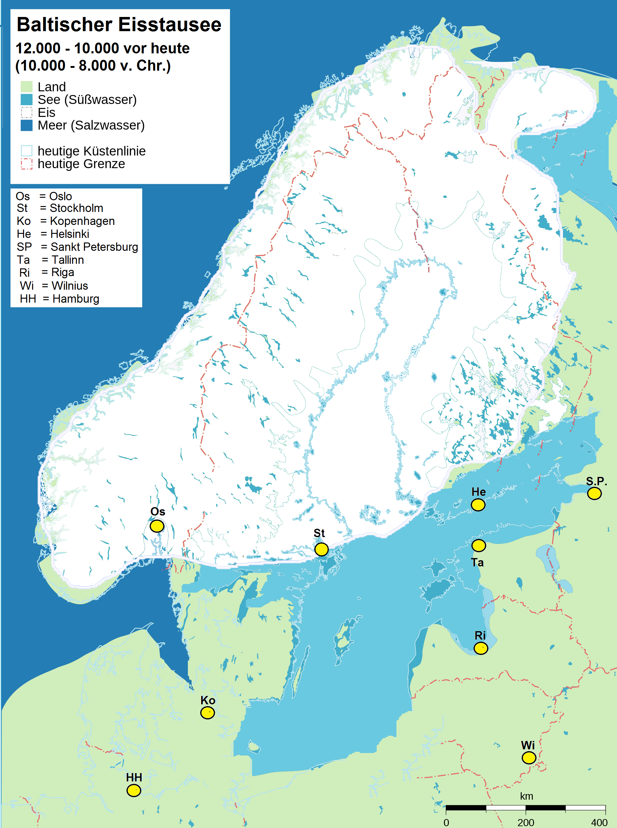 Baltischer Süßwassersee Vorläufer der Ostsee vor 12.000 Jahren